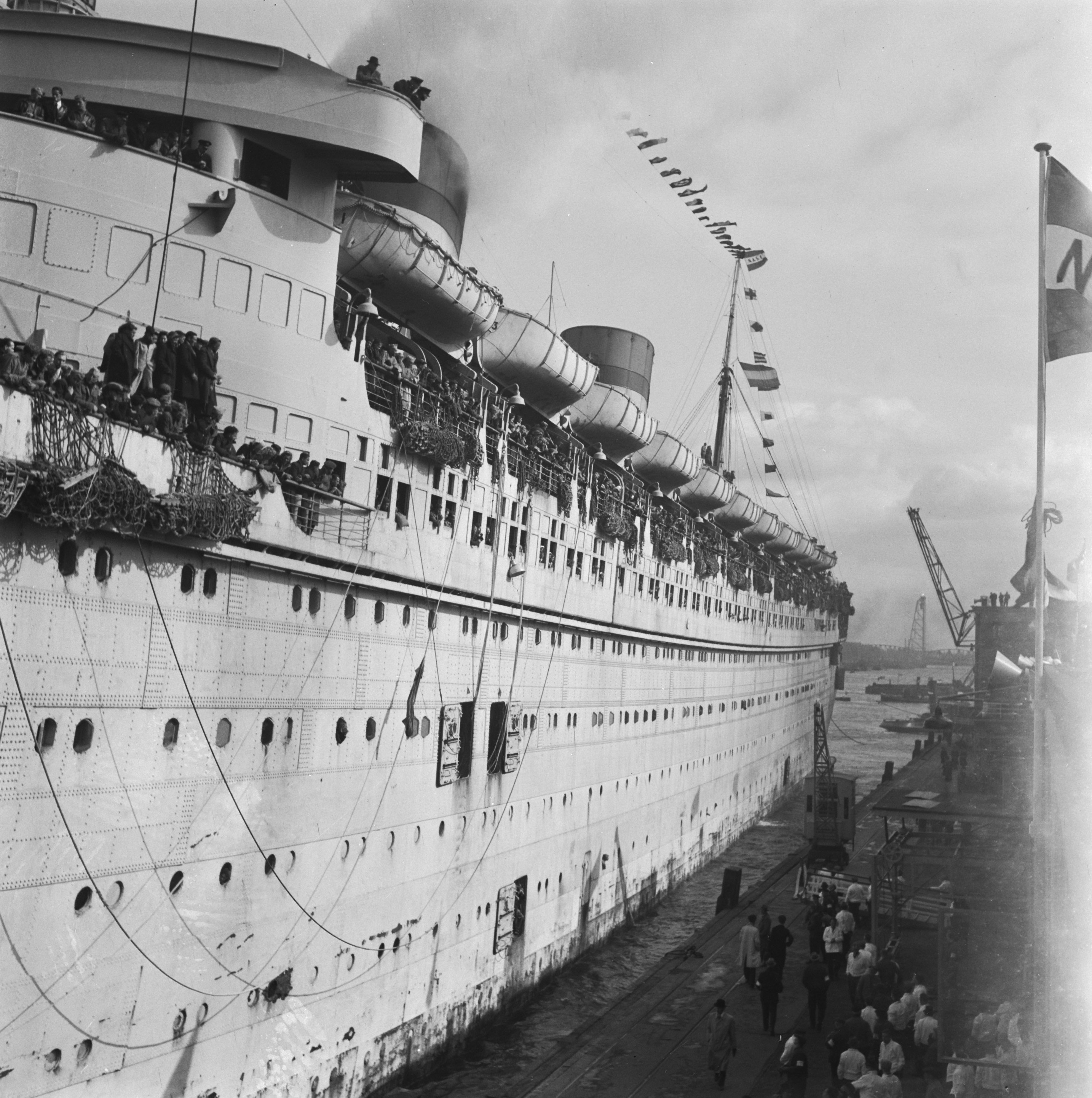 Collectie / Archief : Fotocollectie Anefo Reportage / Serie : [ onbekend ] Beschrijving : Aankomst van de " Nieuw Amsterdam" Datum : 11 april 1946 Trefwoorden : AANKOMST Fotograaf : Haren Noman, Theo van / Anefo Auteursrechthebbende : Nationaal Archief Materiaalsoort : Negatief (zwart/wit) Nummer archiefinventaris : bekijk toegang 2.24.01.03 Bestanddeelnummer : 901-6553 Reacties Geplaatst door Neeltje Maria op 26 januari 2016 - 21:58. Het troepentransportschip vervoerde 3600 gerepatrieerden uit Indië naar Nederland. Plaats: Rotterdam, Zuid-Holland